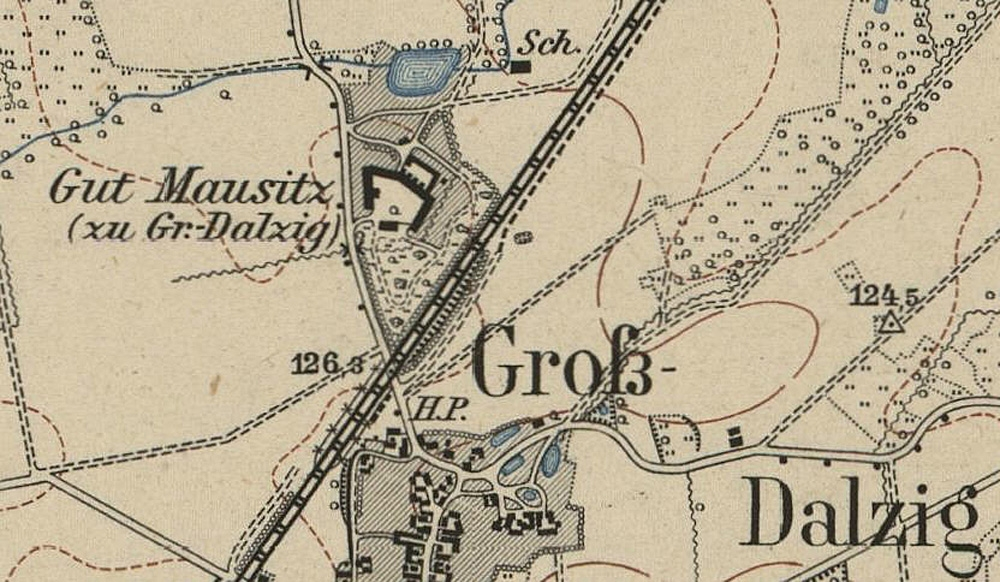 Das Gut Mausitz bei Großdalzig auf einer Karte von 1909